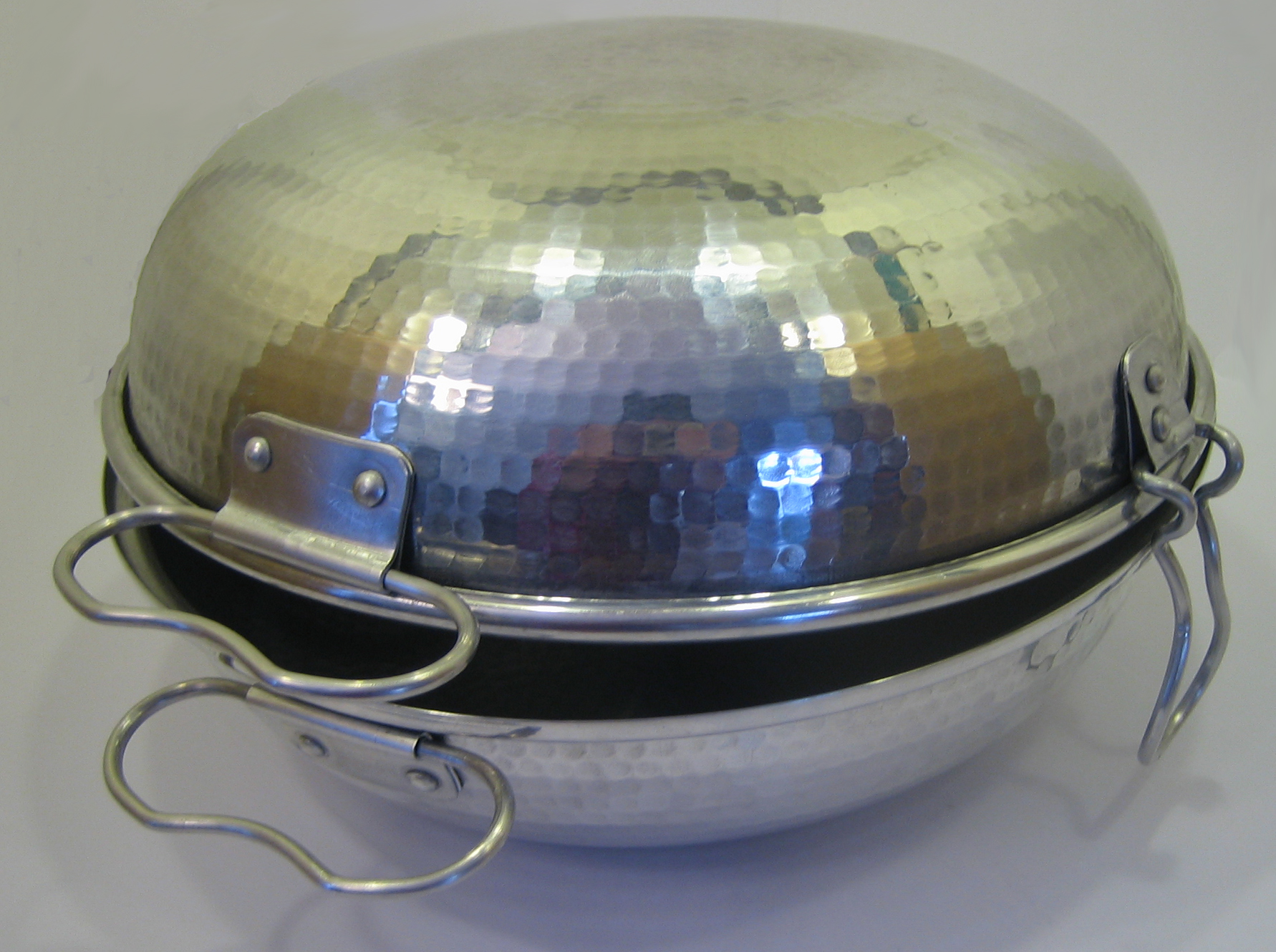 Cataplana